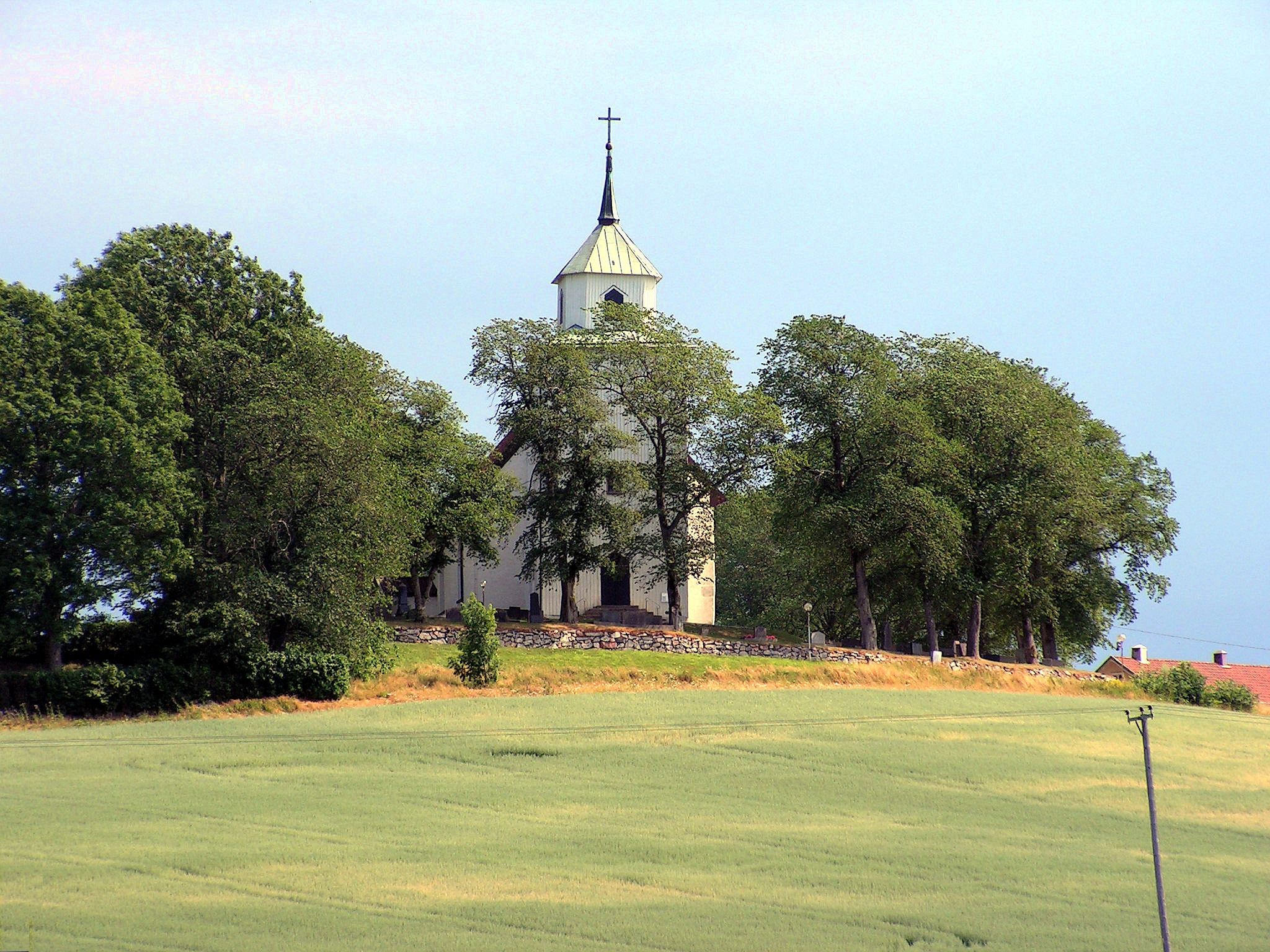 Svarteborgs kyrka, Munkedals kommun, Sverige